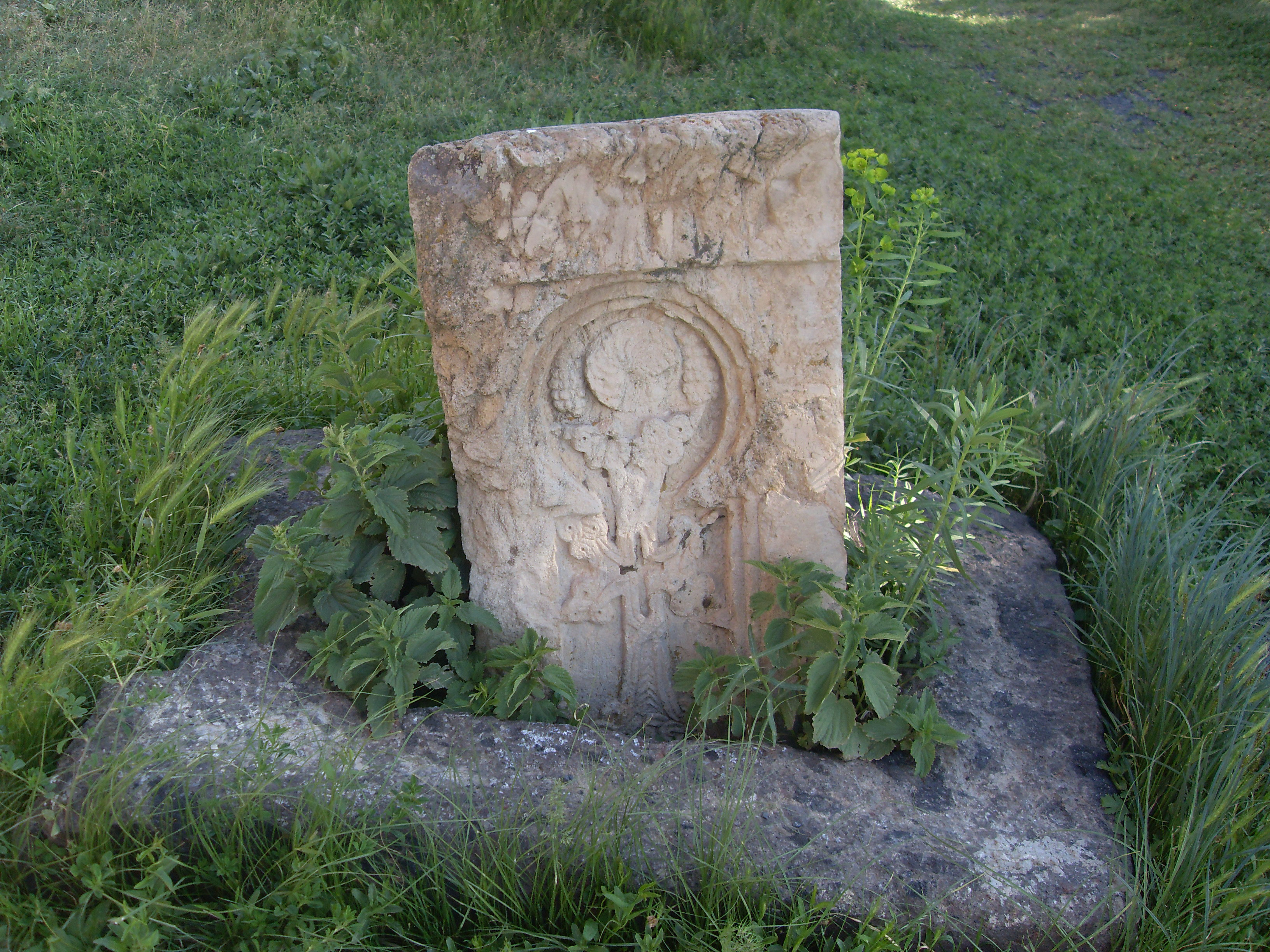 Խաչքար Խաթունի (Սաղմոսավանք), 1218 թ. 93/4.1.11